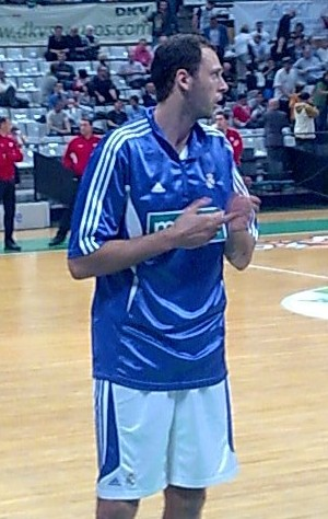 Thomas Van Den Spiegel en el Olímpico de Badalona